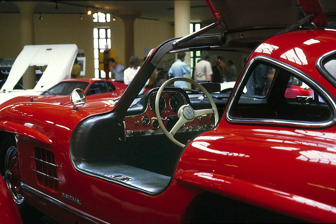 Beschreibung: Mercedes-Benz 300 SL im Rennsportmuseum am Nürburgring Fotograf: Lothar Spurzem Datum: 1986